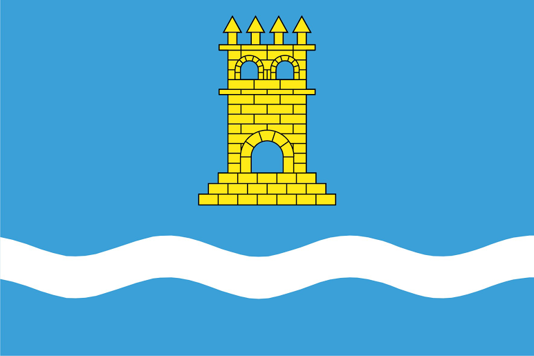 Bandera del municipio